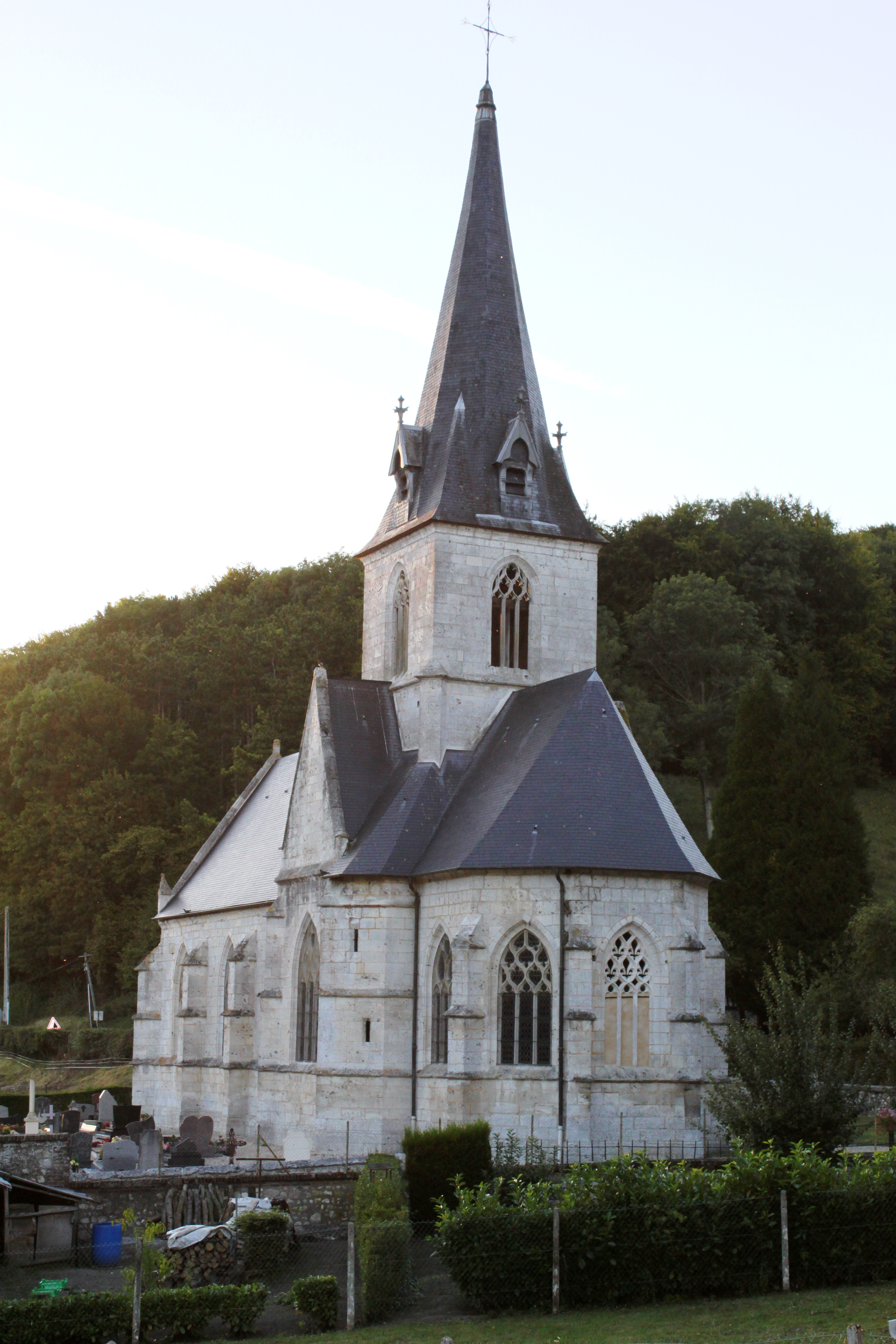 L'église de Sainte-Gertrude, au cœur de la vallée de la Sainte-Gertrude. Charles IX y passa.